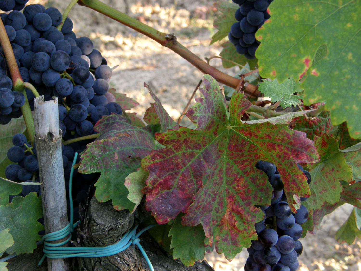 From Azienda Agricola Beconcini Pietro